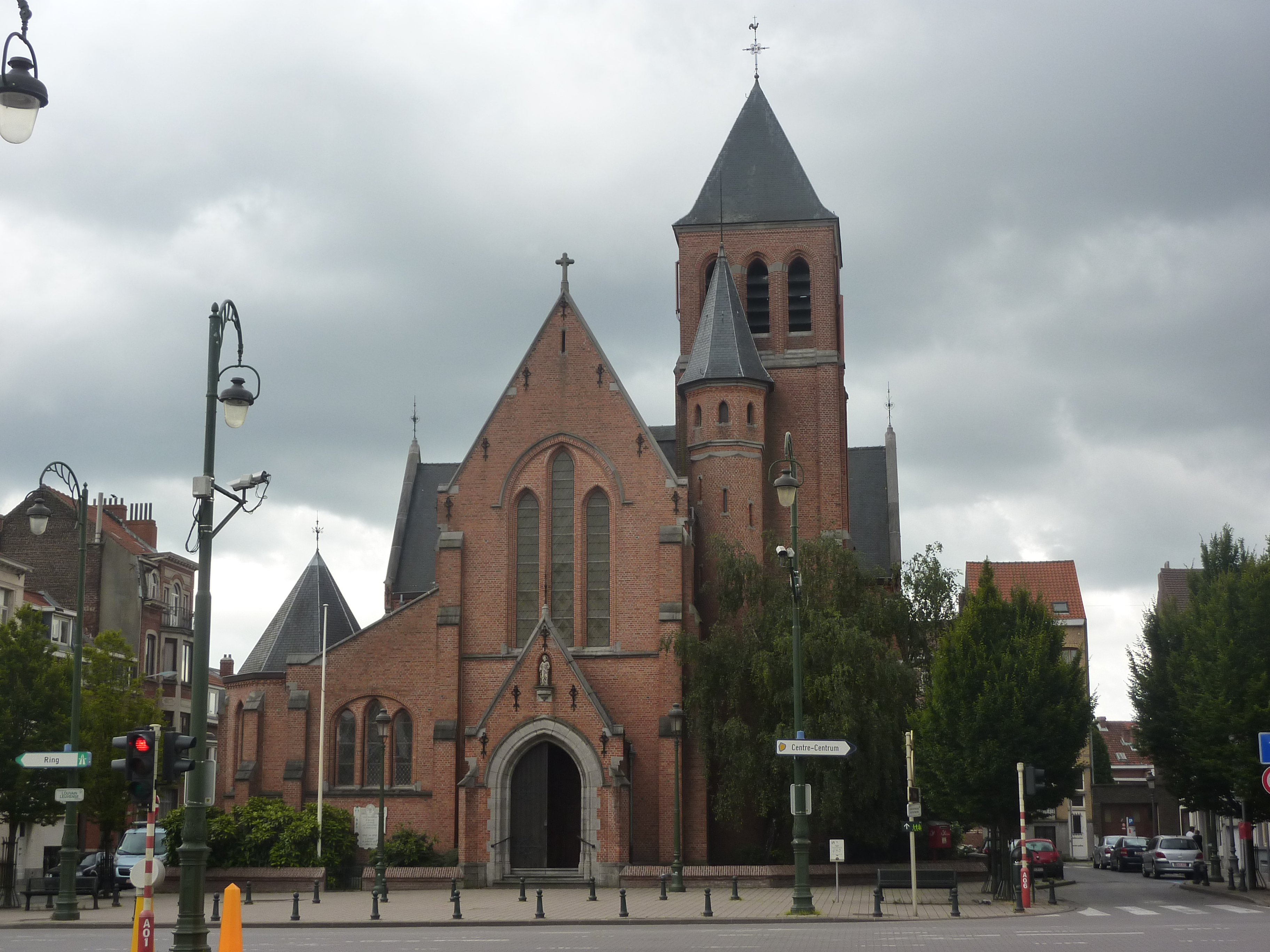 L'église Saint-Joseph, place Jean De Paduwa à Evere, Bruxelles, Belgique.